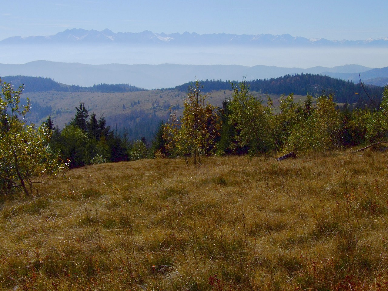 Od góry:Tatry, Pasmo Lubania, grzbiet Piorunowca w Gorcach i Hale Gorcowskie, Gorc Młynieński